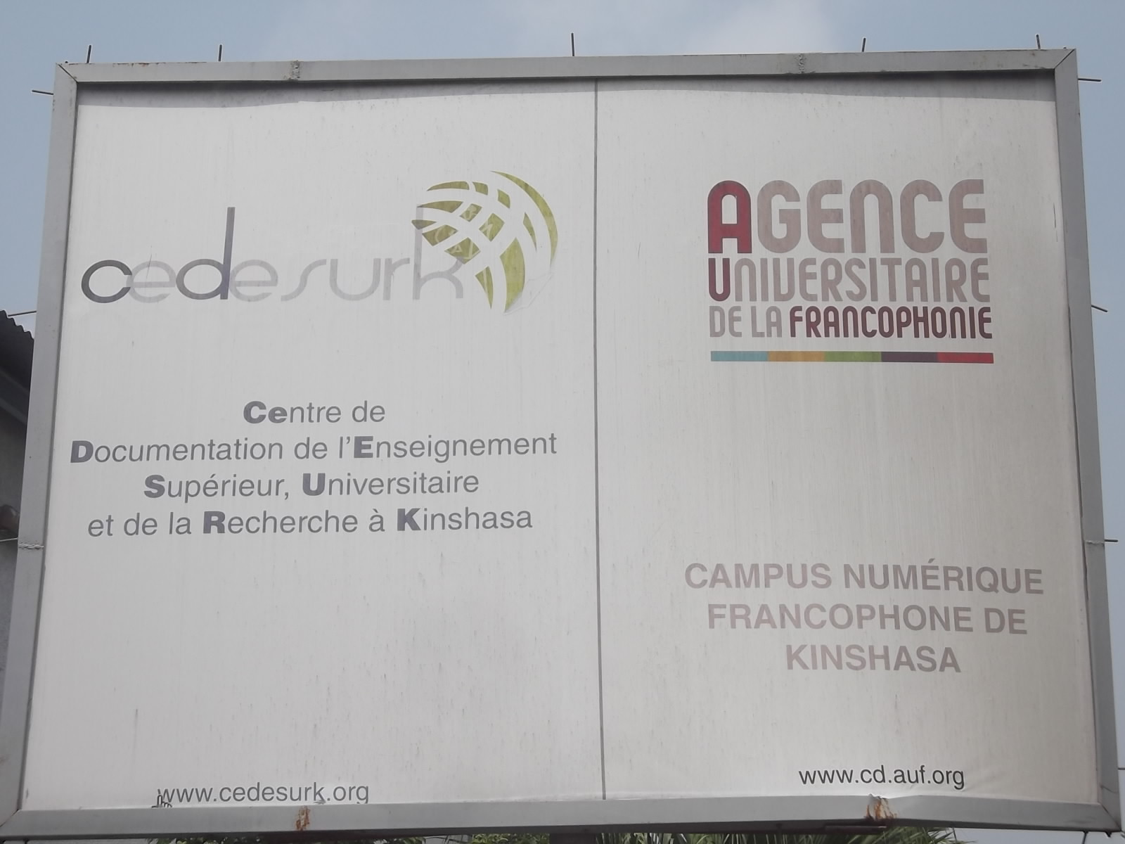 Paneau d'affichage à l'entrée du CEDESURK